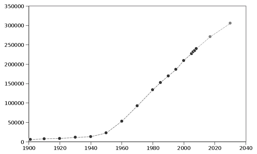 Espoon väestömäärä sekä ennuste Espoo-artikkelin väestötiedoilla (ennuste vuosille 2017 ja 2030 harmaalla).